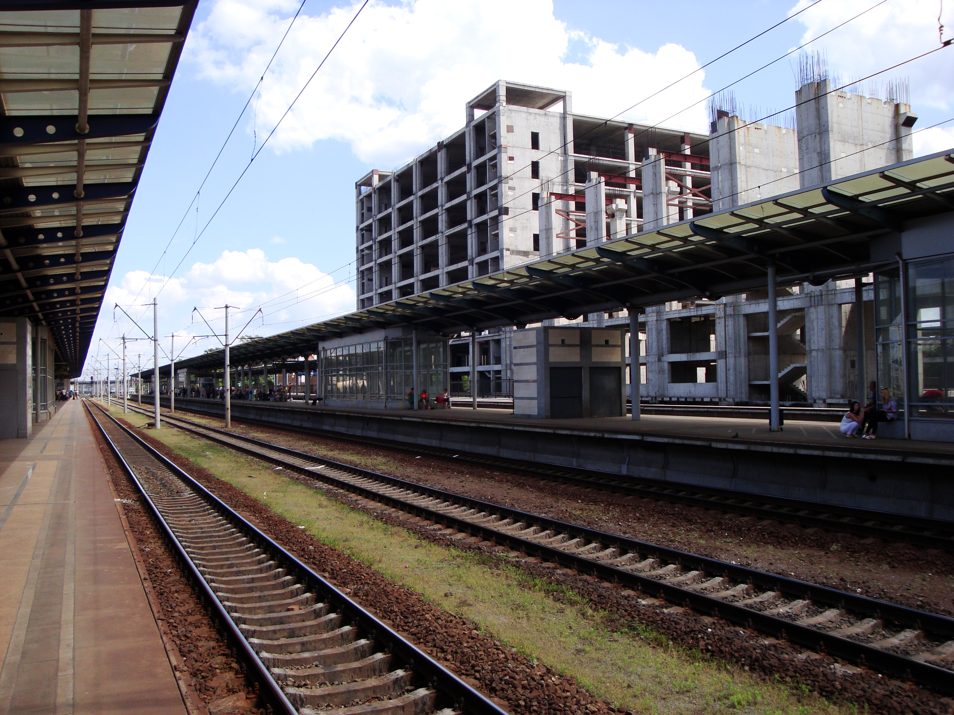 Пасажирські платформи Дарницького вокзалу